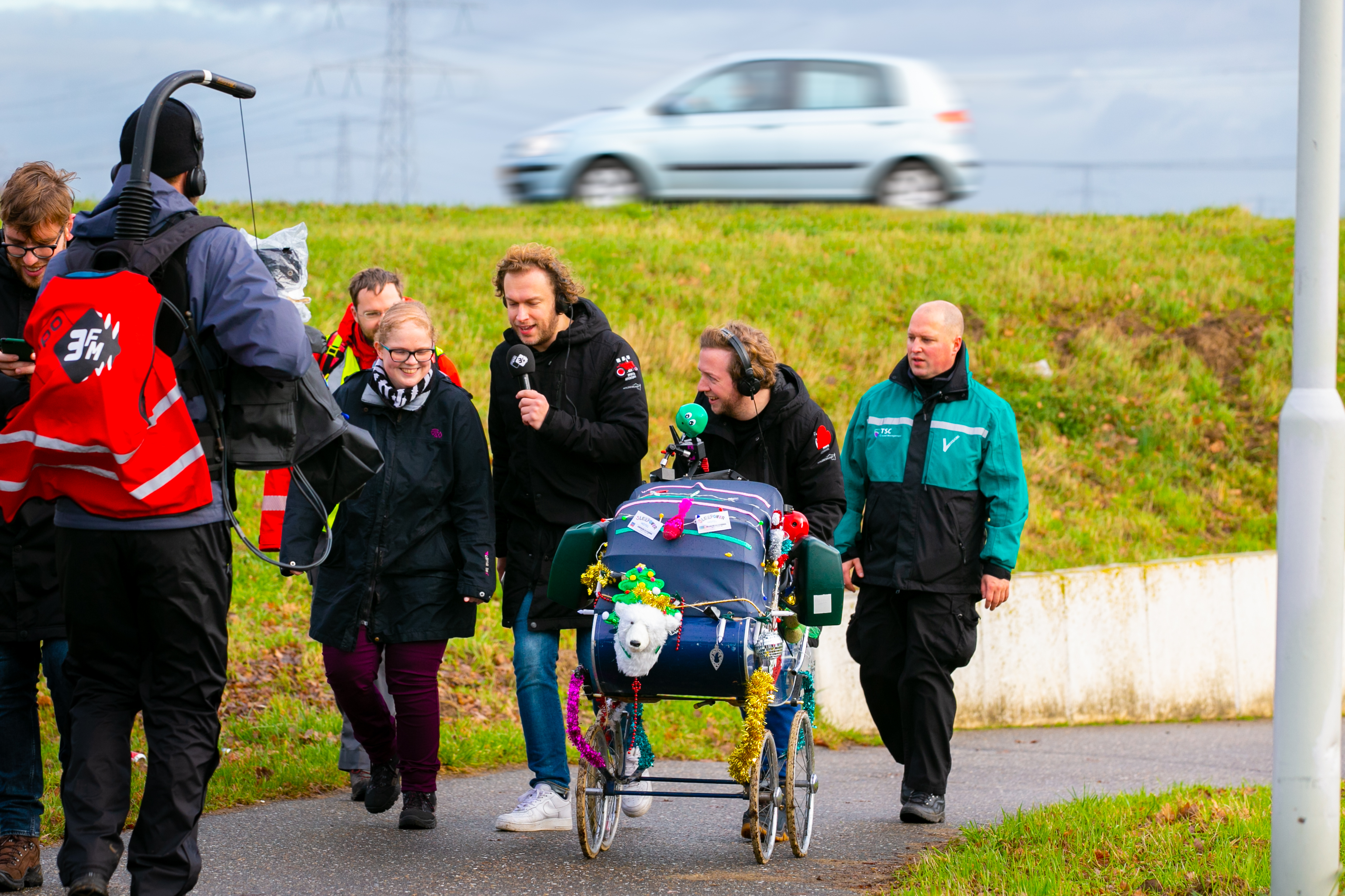 Dj team Mark en Ramon tijdens Serious Request 2018